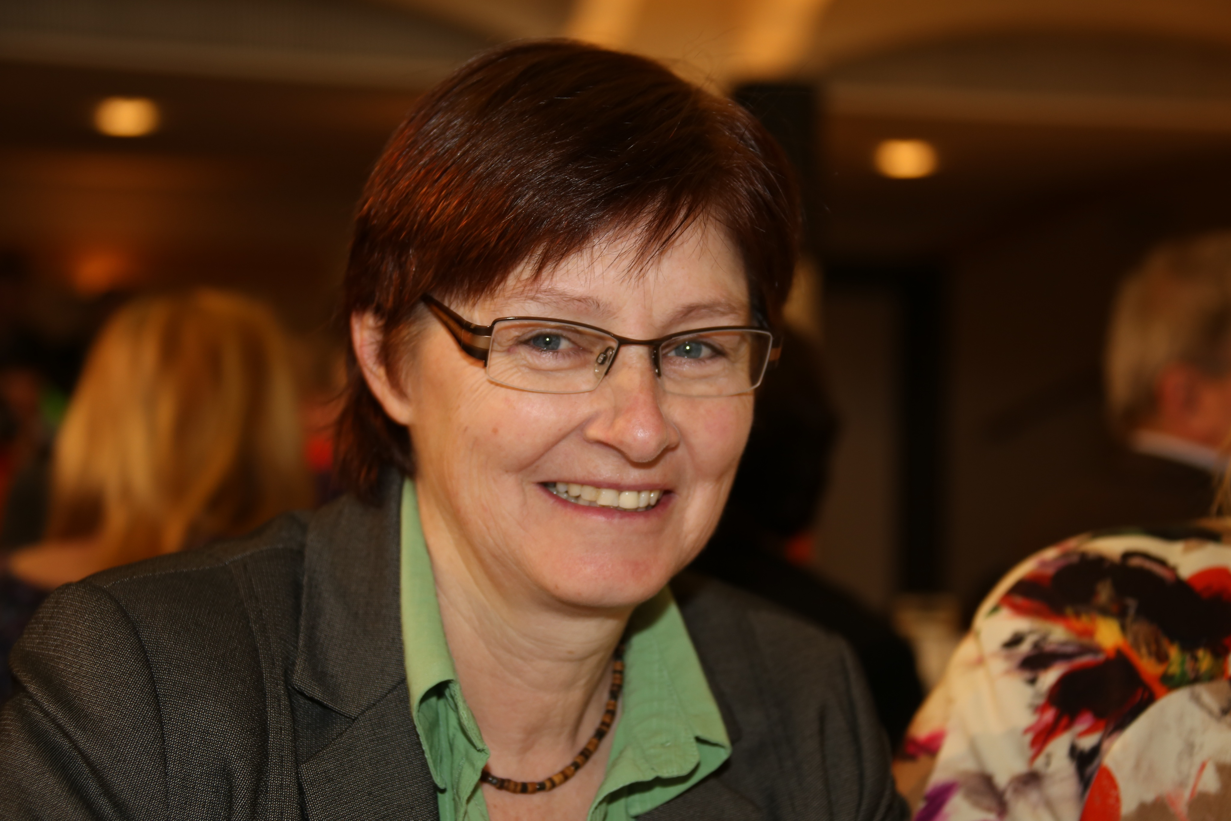 Rosi Steinberger